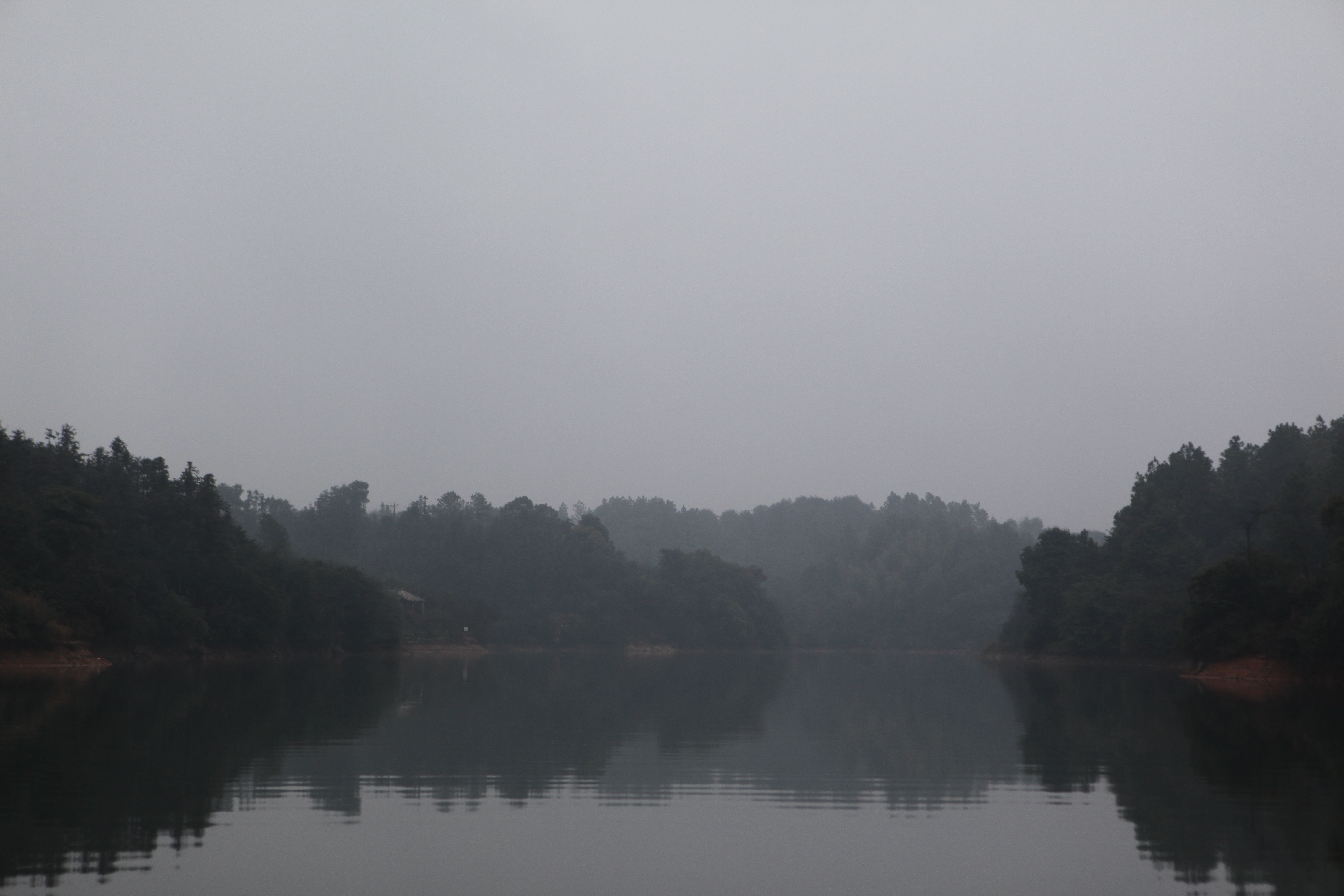 2012 江西 新余 仙女湖